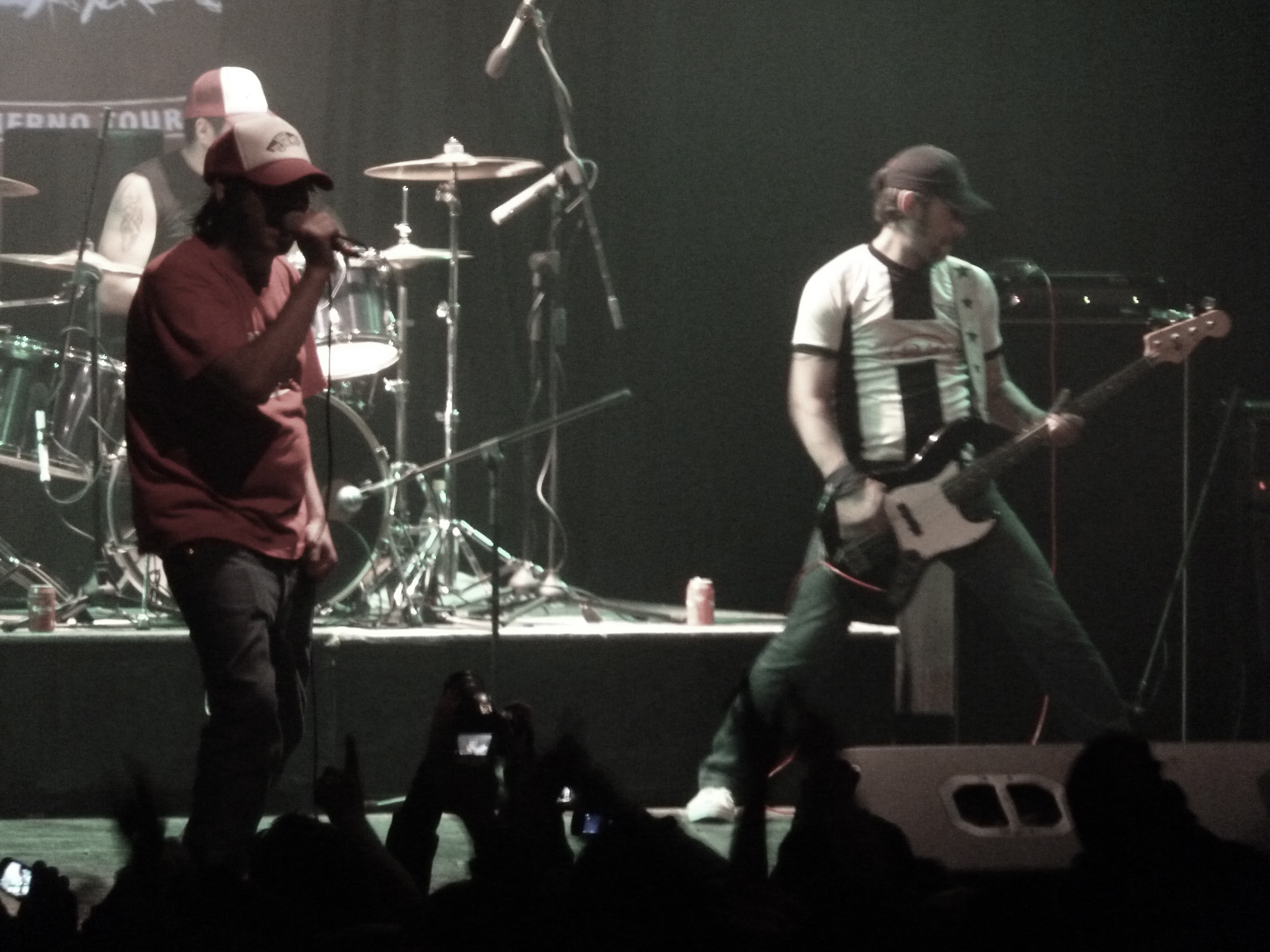 La banda de punk rock Argentina, 2 Minutos en un concierto en Chile, en el año 2011.